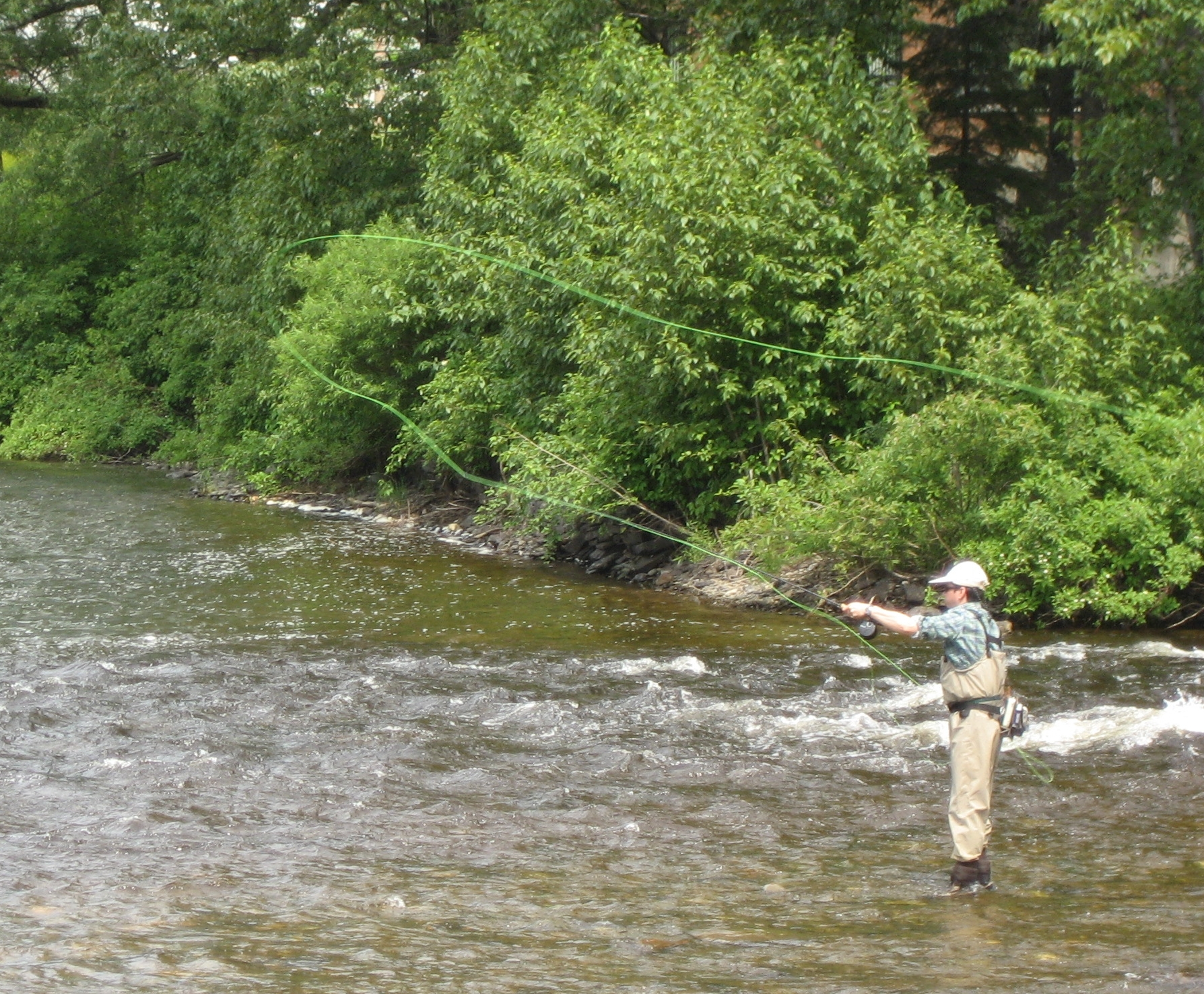 Pêcheur au saumon sur la rivière Matapédia (fosse Les Fourches, Causapscal, Québec). Photo prise par Declic le 26 juin 2006.